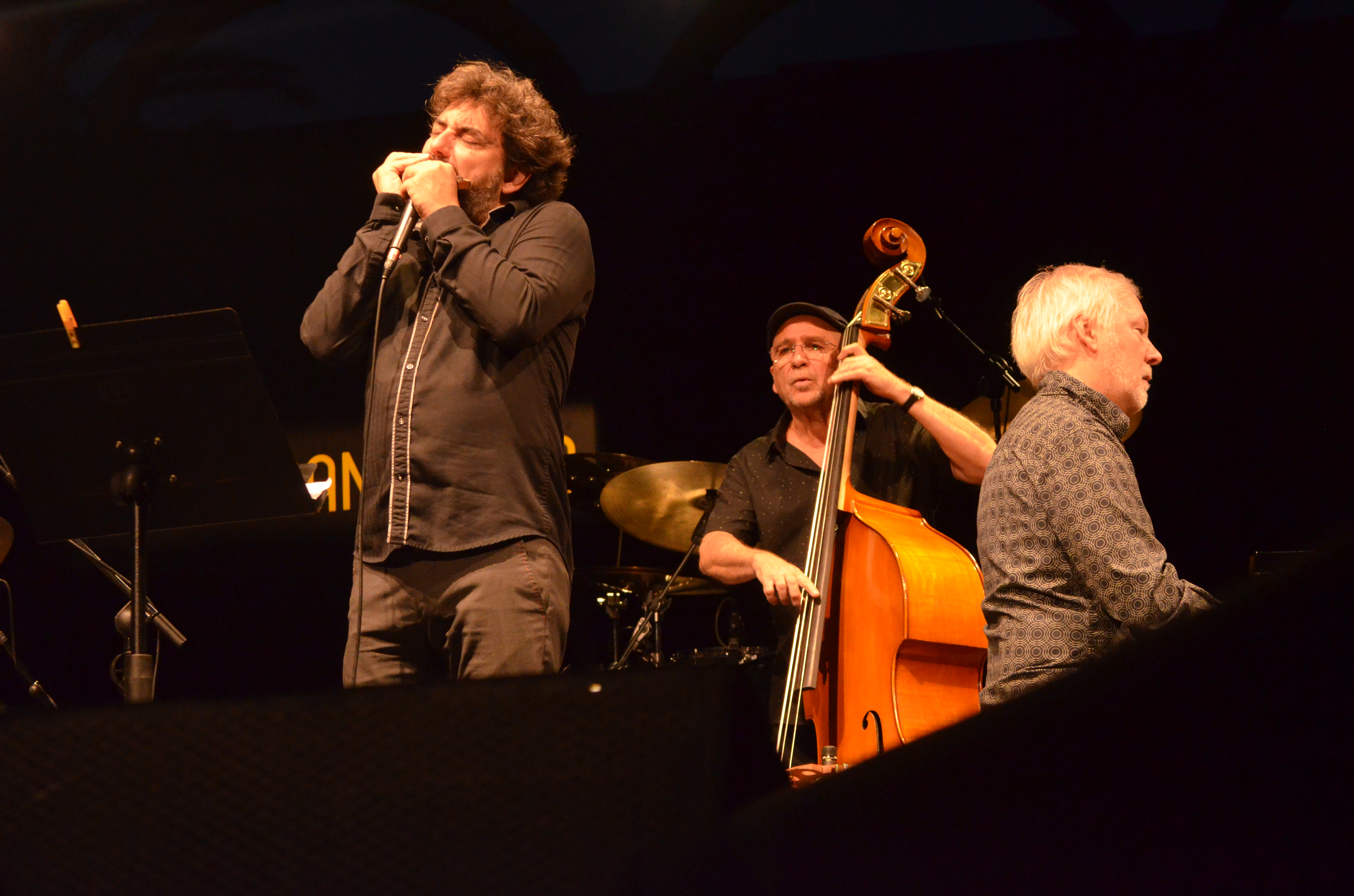 Concierto de Ignasi Terraza (piano) y Antonio Serrano (armónica) en el Festival Internacional de Jazz de San Javier, 21 de julio de 2018